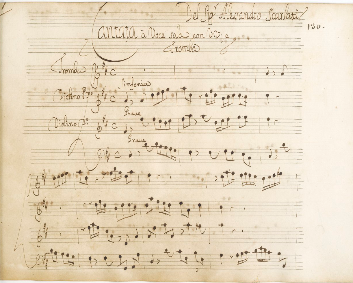 Le titre et l'incipit de la cantate de chambre d'Alessandro Scarlatti, «Su le sponde del Tebro » H.705, dans la copie de la BnF (RES VMC MS-68, f°130).